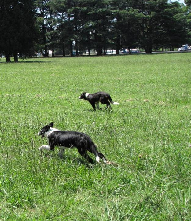 Perros adiestrados para la dispersión de aves.